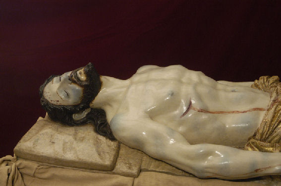 Santísimo Cristo Yacente de Priego